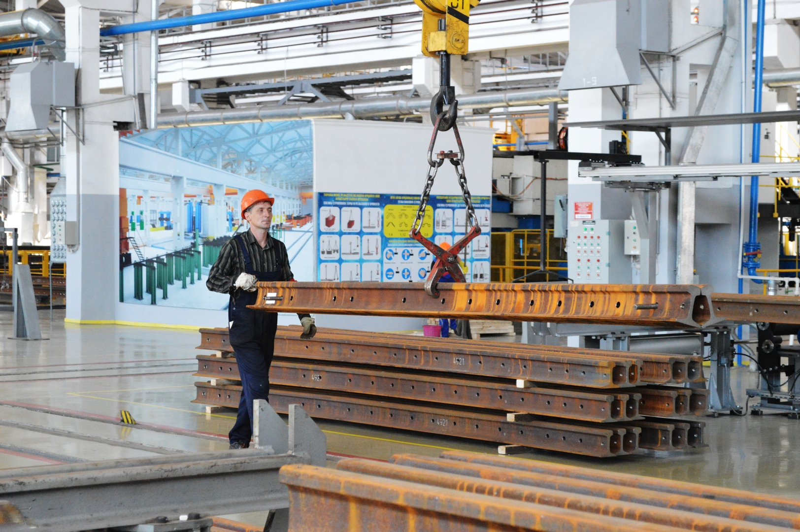 Проммашкомплект